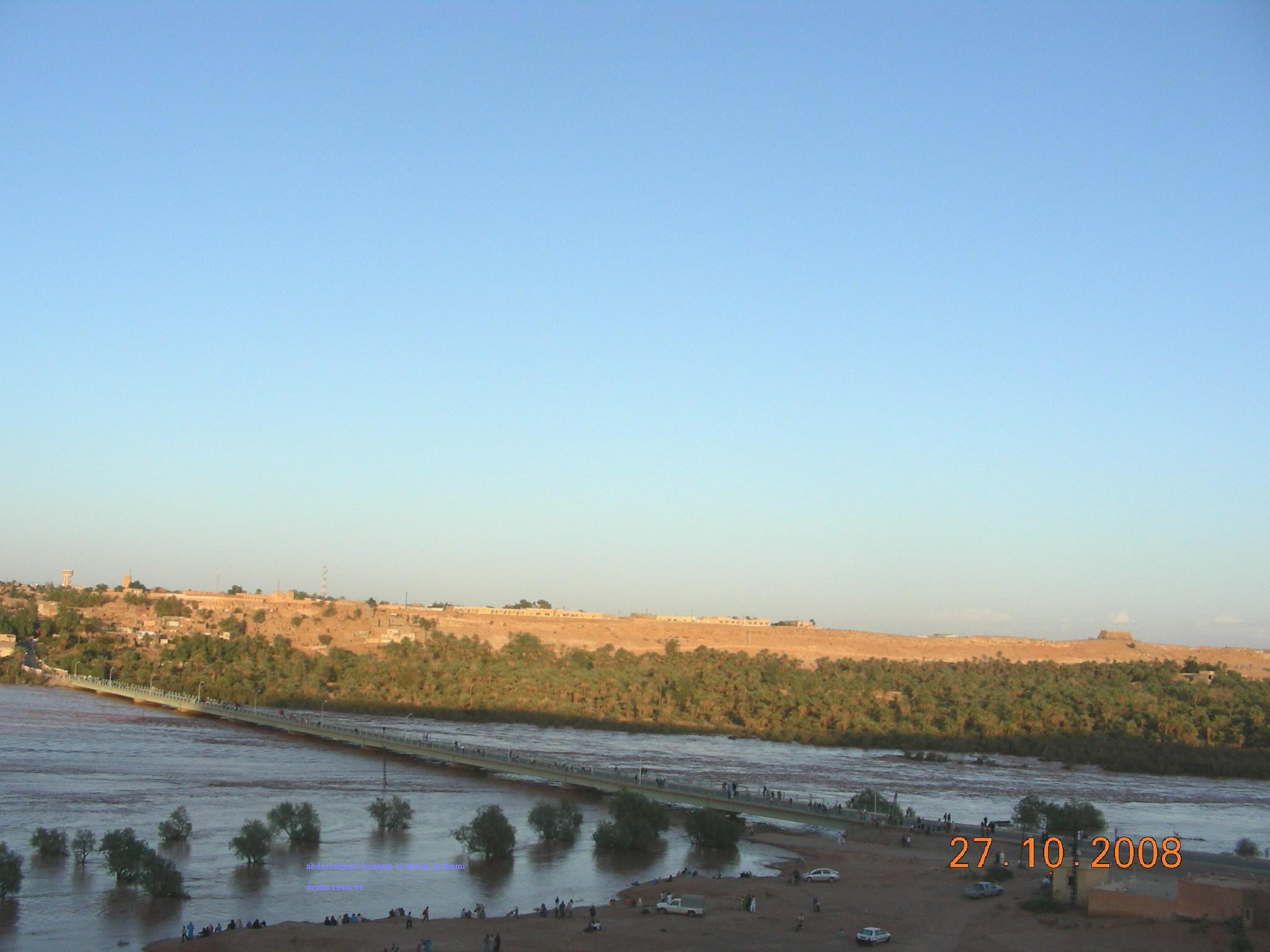 وادي الساورة الطول:1200كلم مساحة الحوض:380.000كلم مربع سرعة التدفق:30 متر معكب في الثانية المنبع :جبال الاطلس الكبير